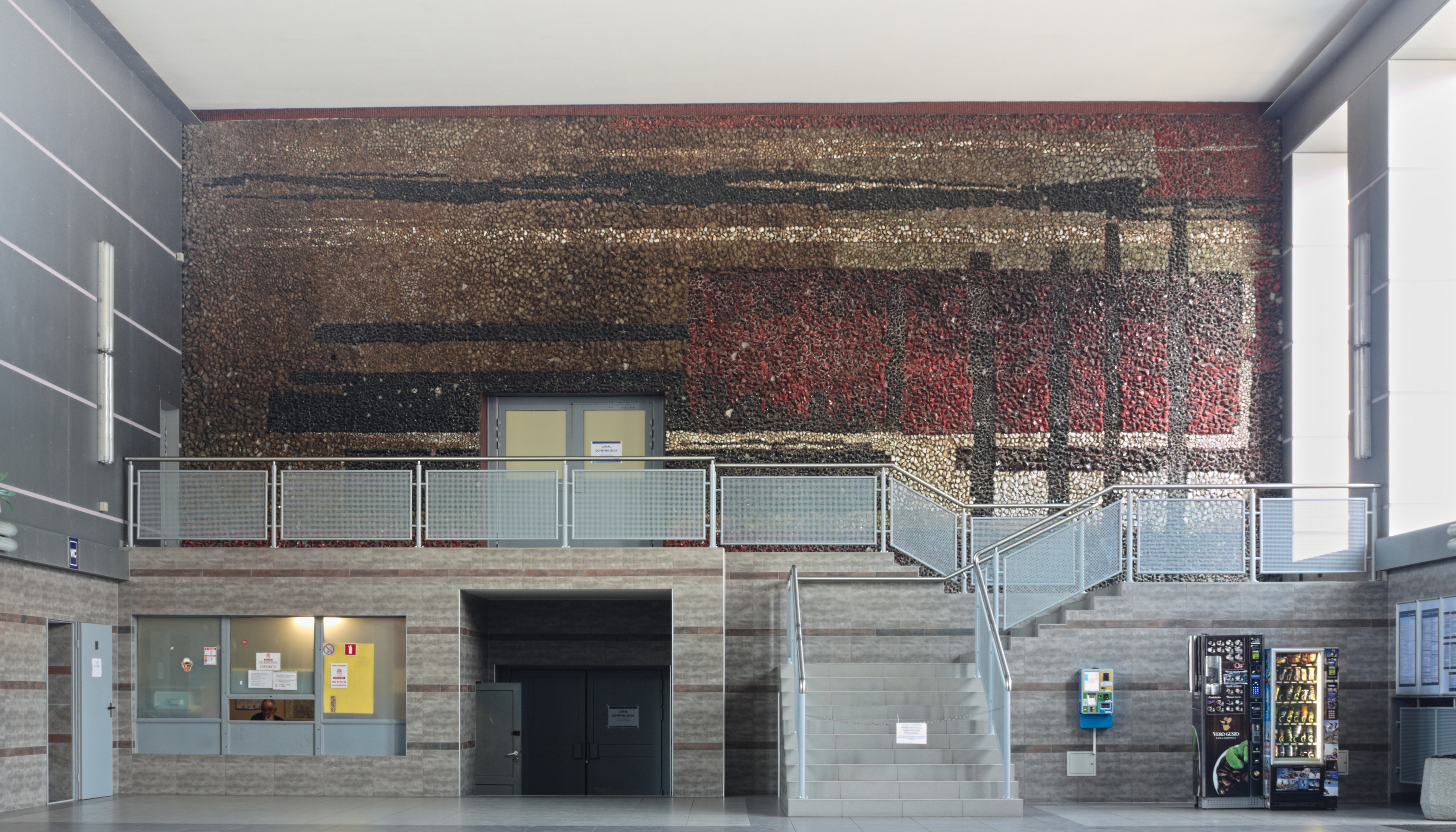 mozaika (ze stłuczki szklanej?) autorstwa Kazimierza Gąsiorowskiego na ścianie wewnątrz holu dworca stacji kolejowej Bytom w Bytomiu